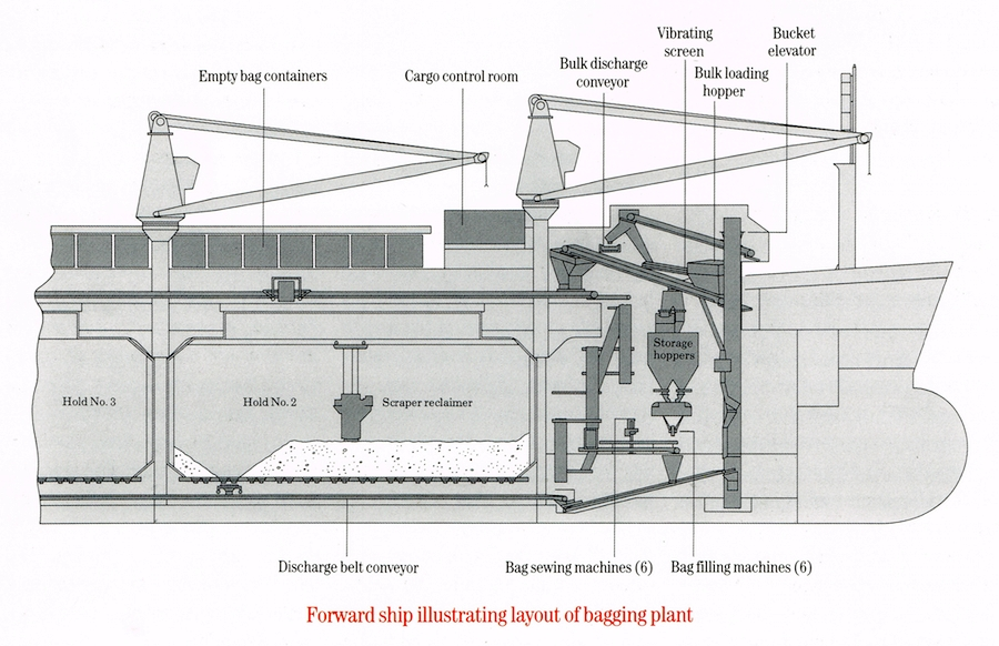 מערכת אונית צובר מתמחה ביבו